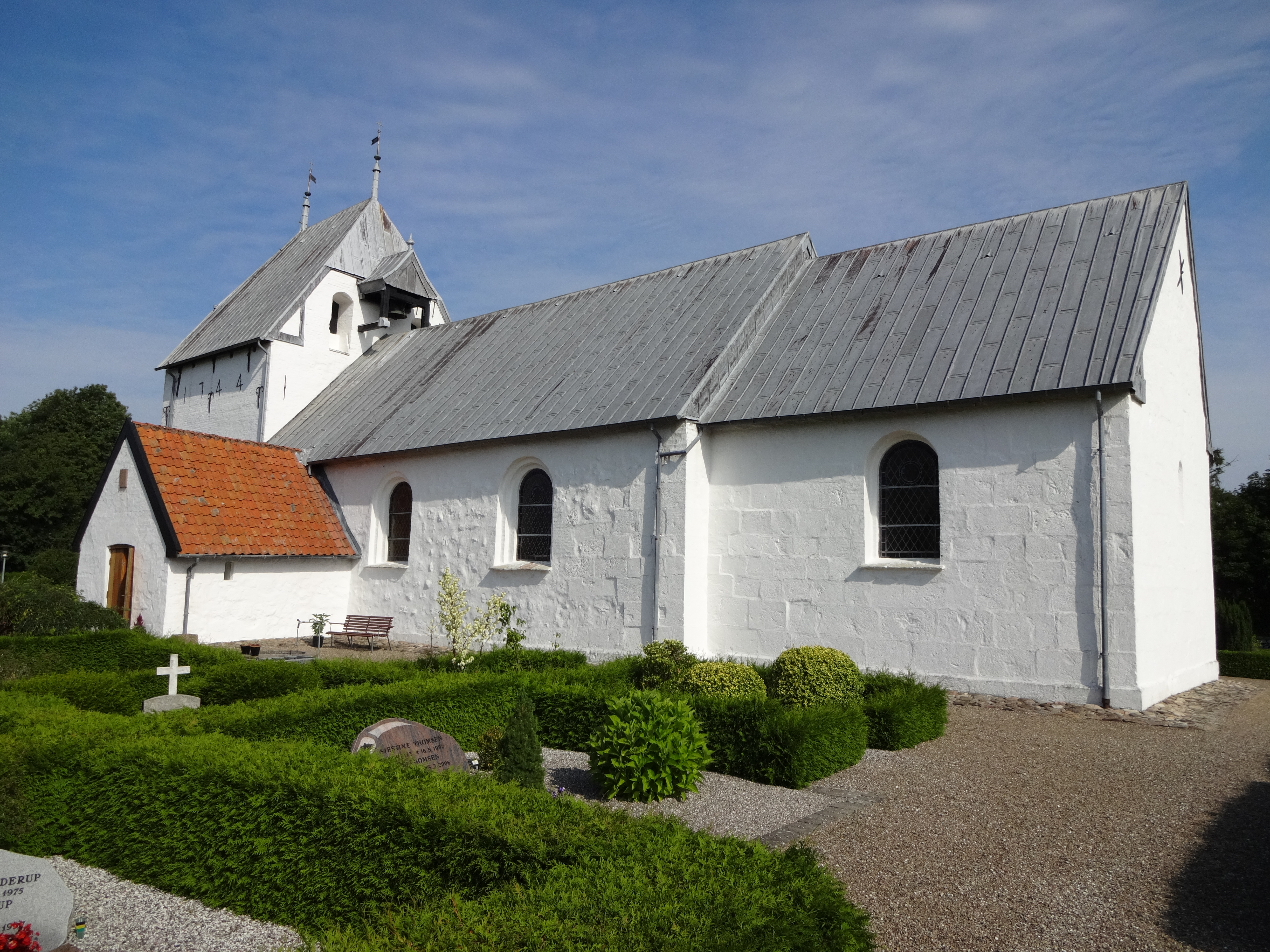 Jegerup Kirke